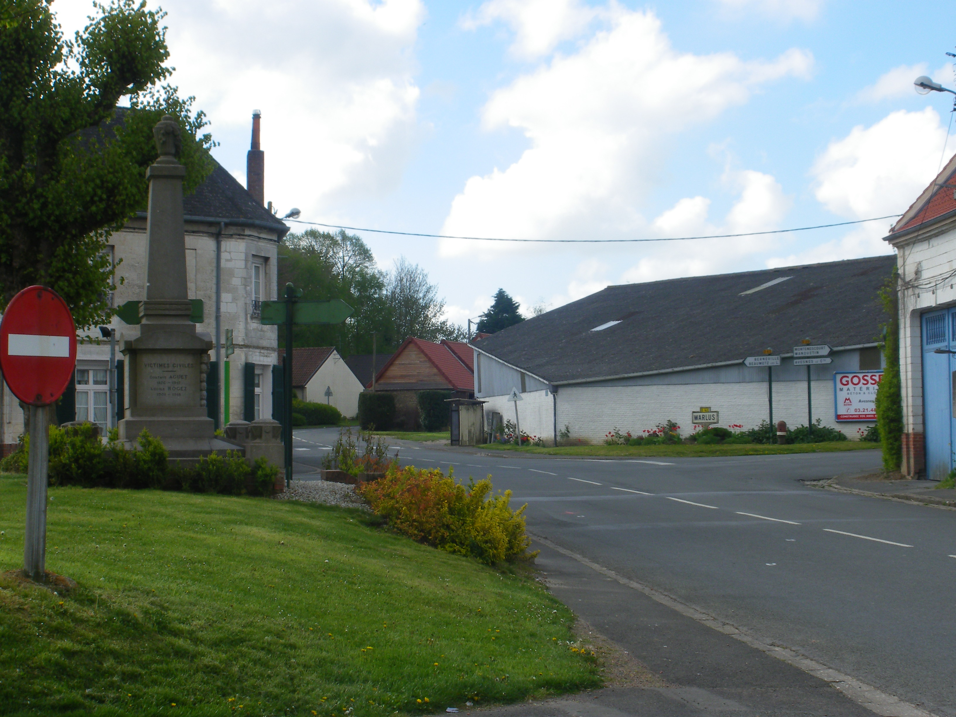 Vue de Warlus à l'intersection des départementales D59 et D62.